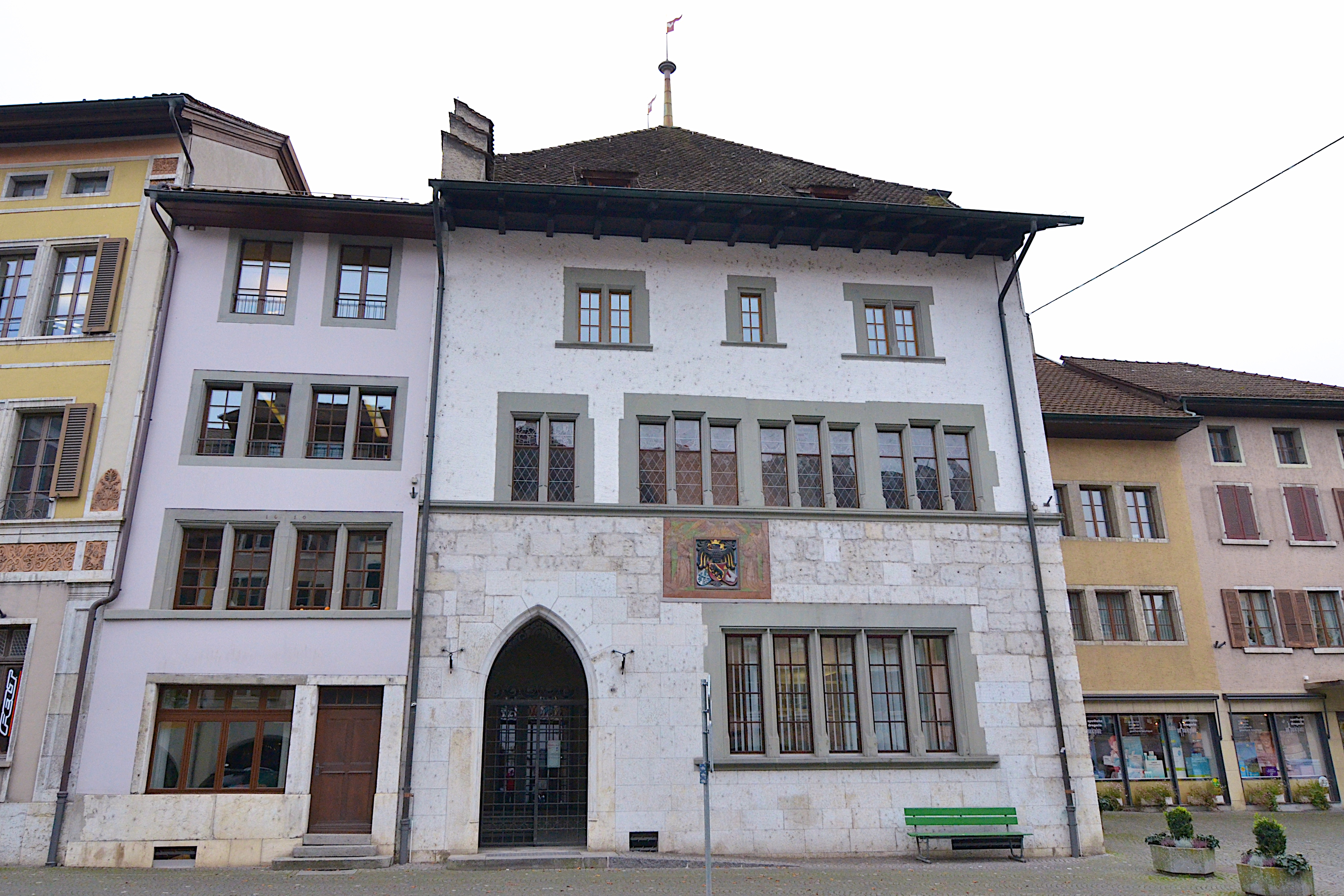 Schützenswertes Objekt an der Hauptgasse 10